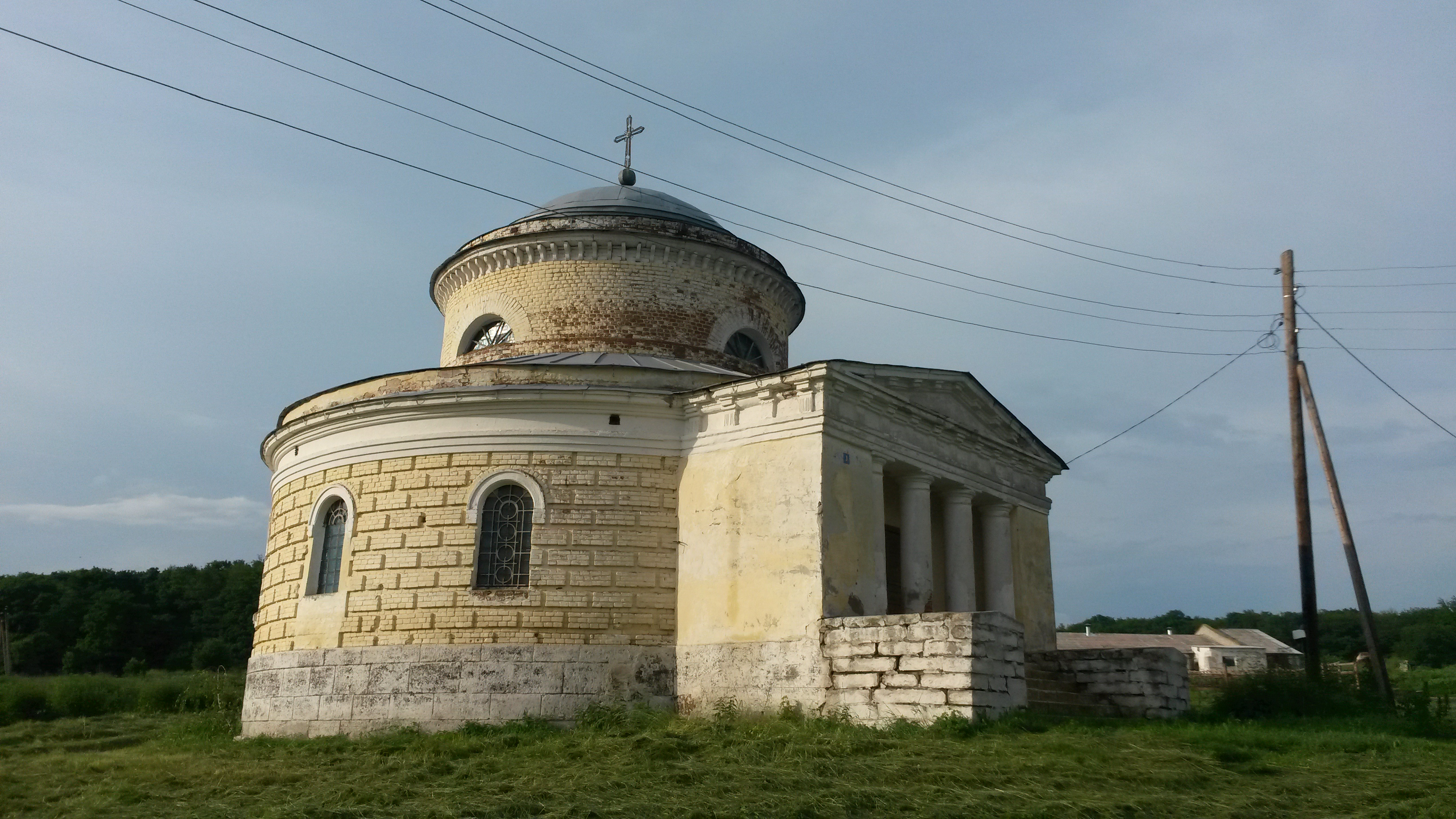 Усыпальница Стаховичей (Липецкая область, Елец, село Пальна-Михайловка)